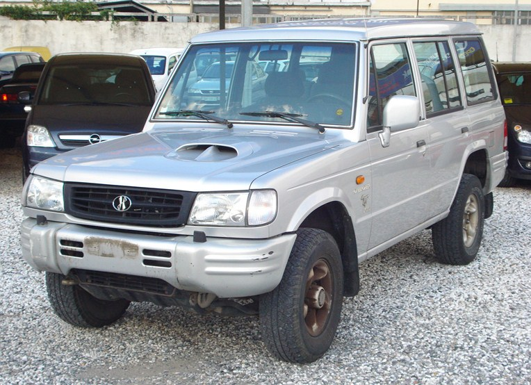 Hyundai Galloper Wagon 2.5 diesel.